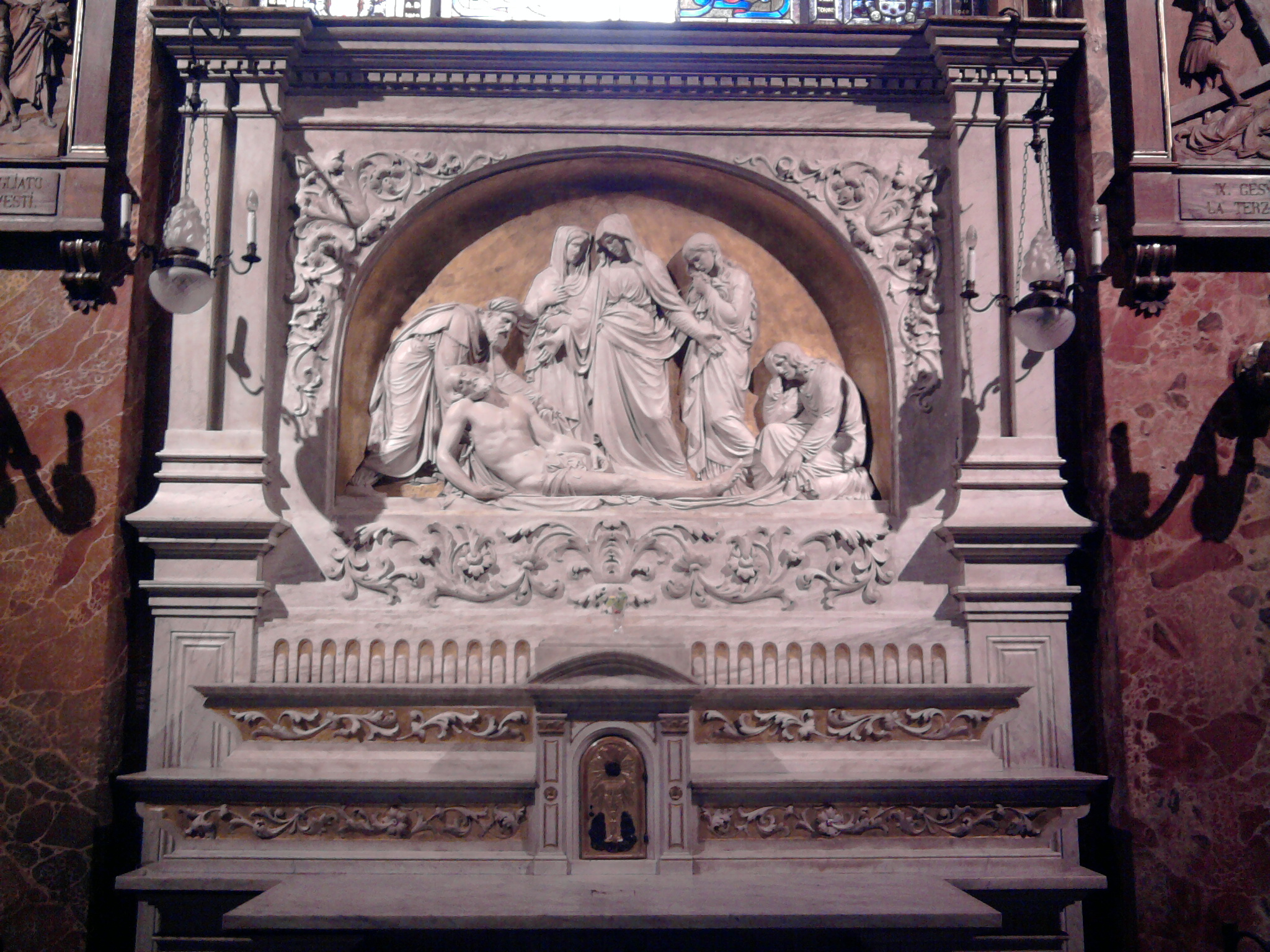 La Pietà nella cappella di San Giuda Taddeo